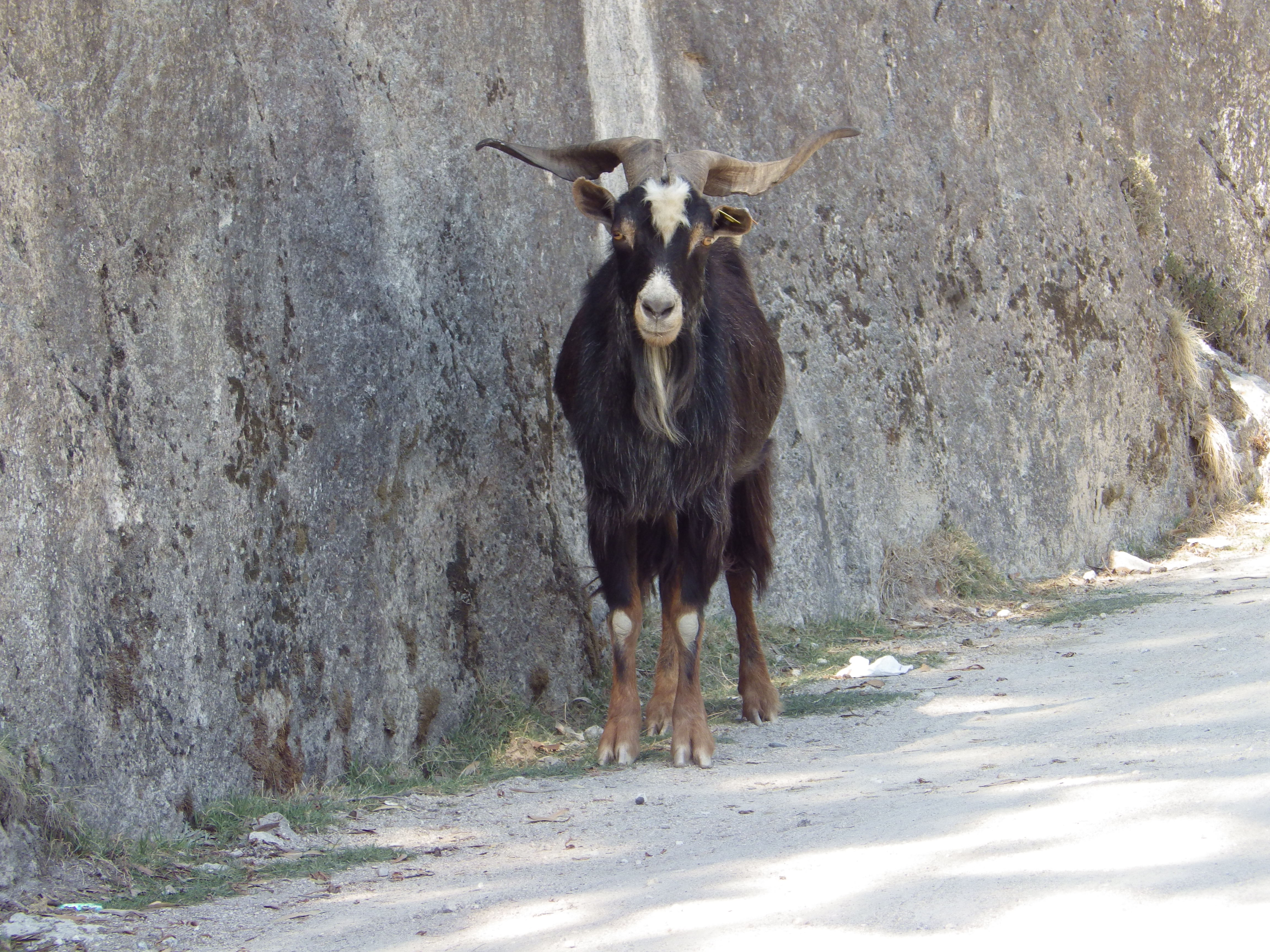 Parque nacional de Peneda-Gerês